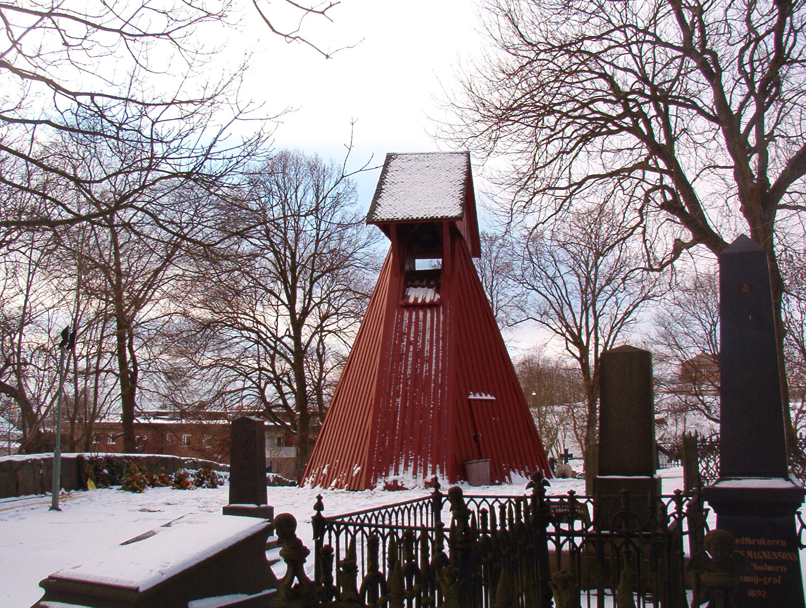 Lundby gamla kyrka Date January 2006